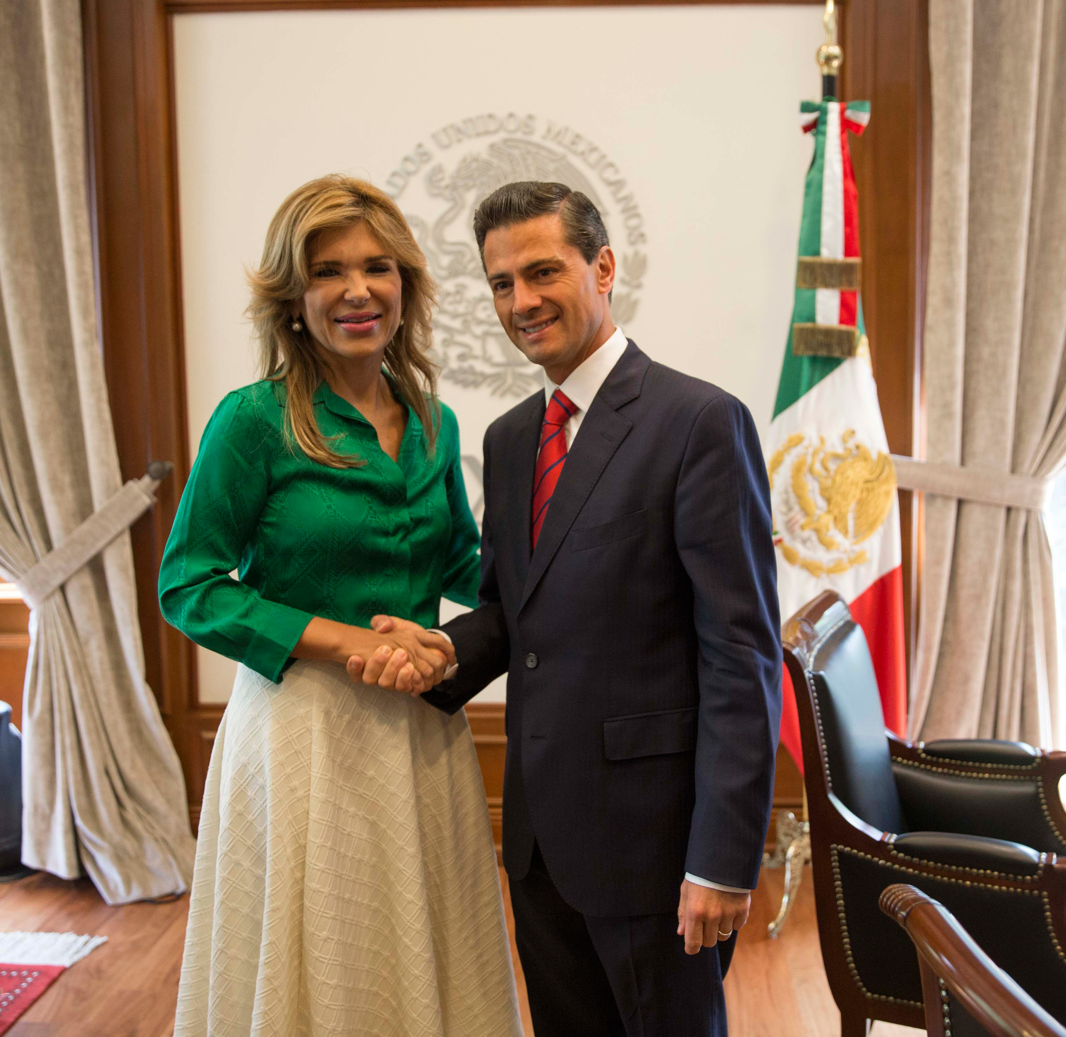 Reunión con Claudia Pavlovich, Gobernadora Electa de Sonora. Residencia Oficial de los Pinos, Ciudad de México. 14 de agosto de 2015.